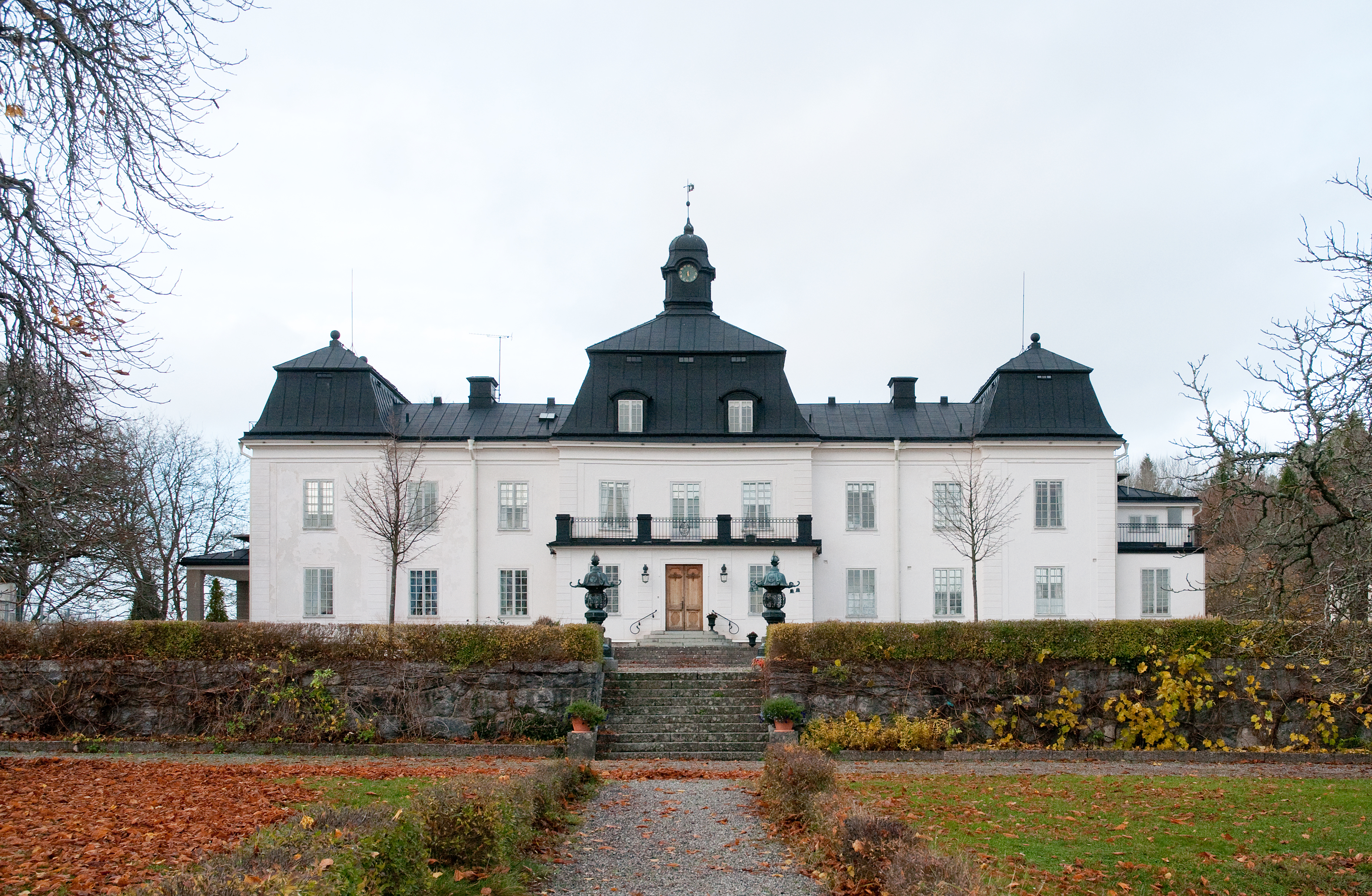 Ökna slott i Bogsta, Nyköpings kommun.